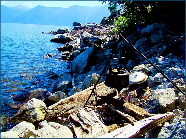 Лагерь на скалистом берегу озера